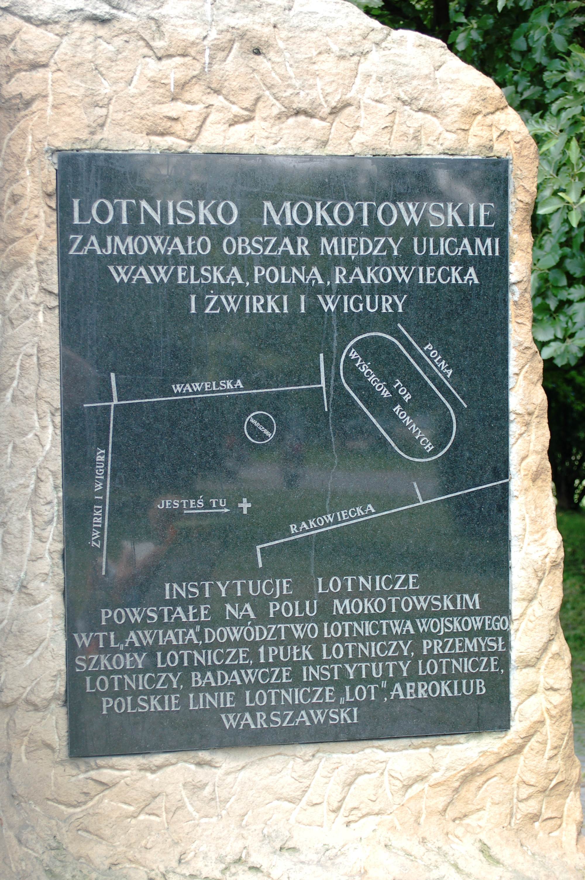 Pole Mokotowskie, Warschau